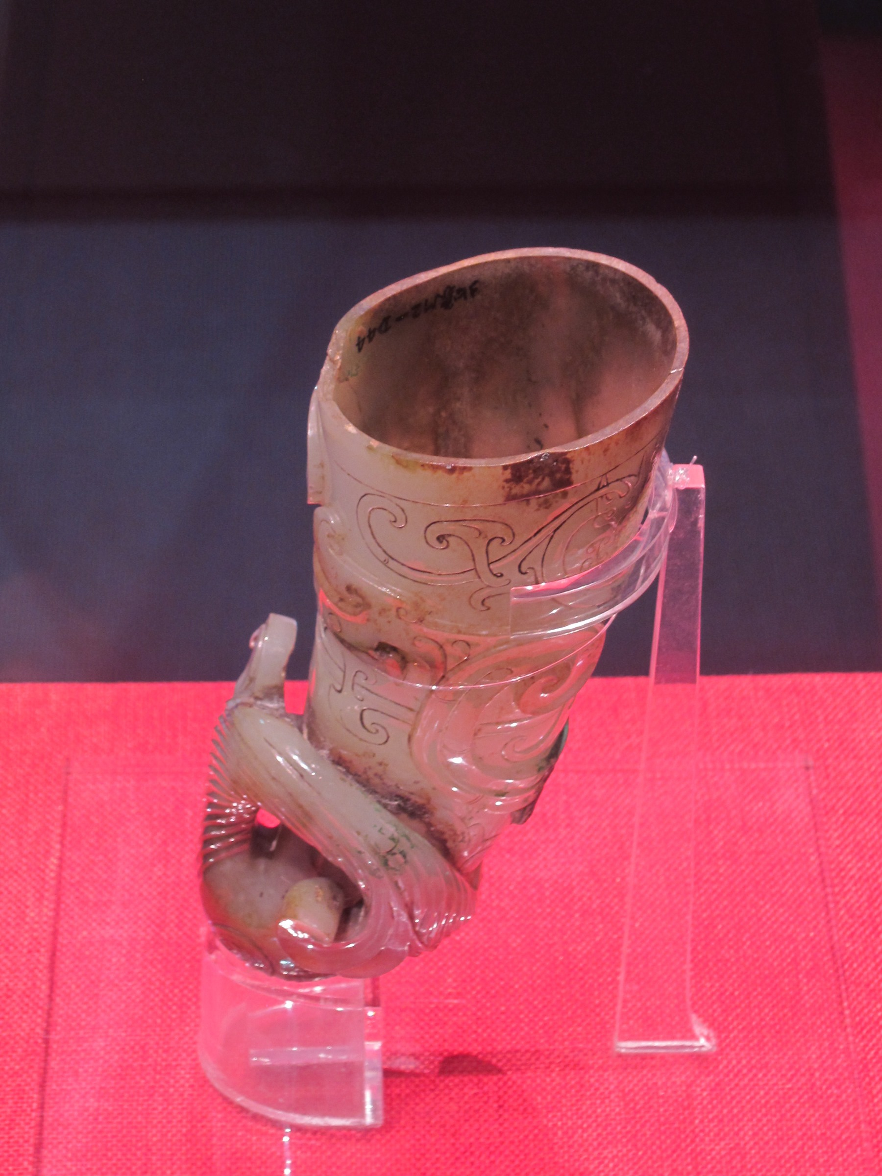 1983年6月廣州越秀區象崗出土,該玉杯出土自墓主棺槨頭箱,出土時有殘留下葬時包裹的紅紗.用一整塊青玉雕而成,微透明,外形呈犀牛角造型,口橢圓,口微折,腹中空,通長18.4厘米,口徑5.9-6.7厘米,口緣厚0.2厘米,重372.7克.集所有玉器雕琢技藝於一身,是漢代玉器里的精品.